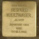 Stolperstein Bockenheimer Landstrasse 9 für Siegfried Würzburger Freigabe [Ticket#2013102810006014] erteilt von Initiative Stolpersteine Frankfurt am Main e.V.